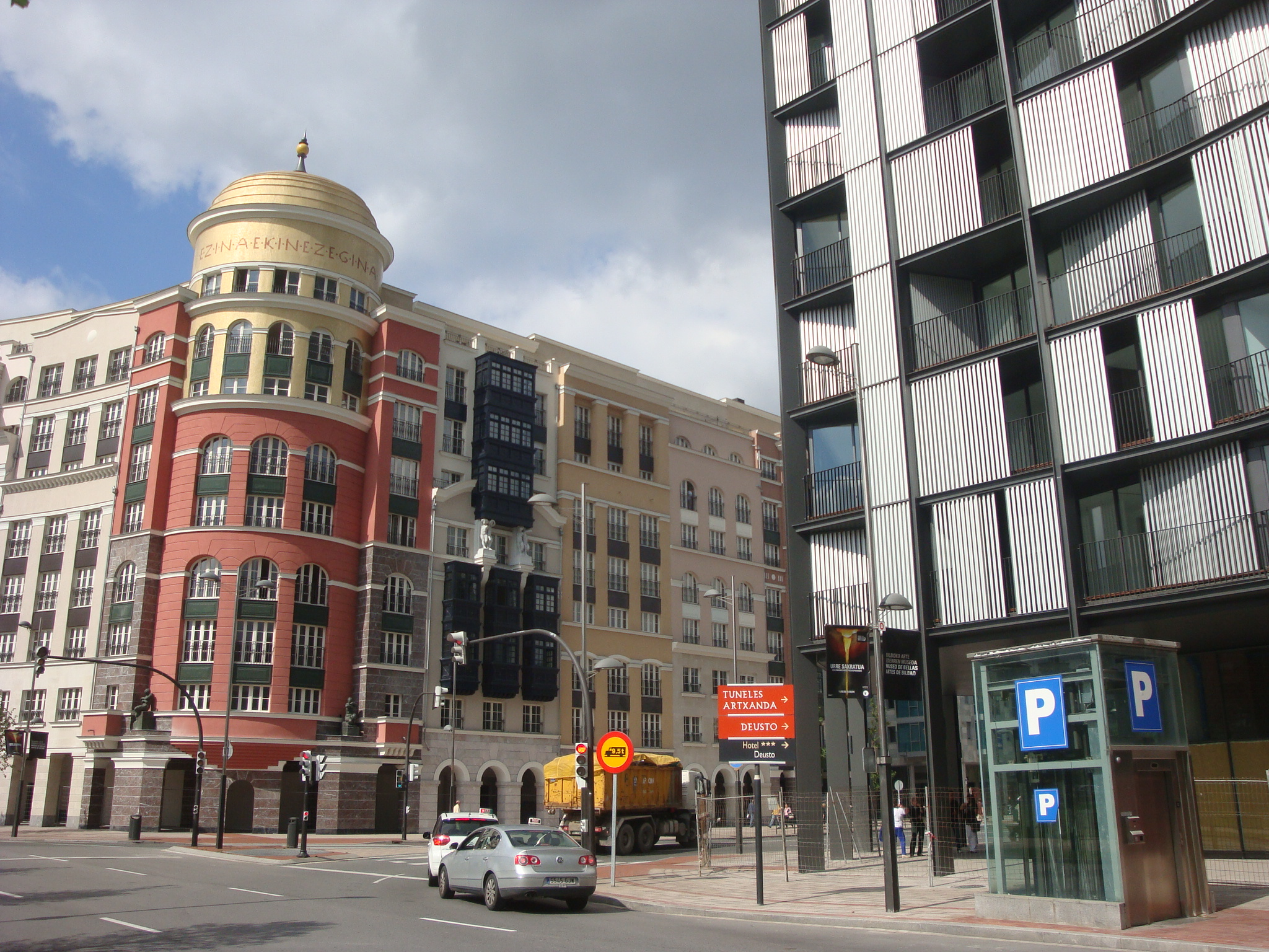 Bilbao